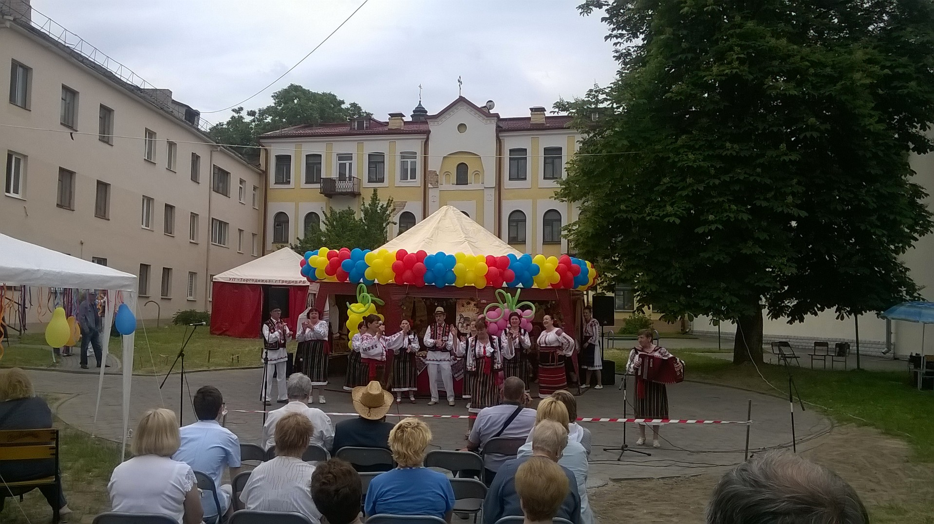 Малдаўскі падворак падчас ХII Рэспубліканскага фестывалю нацыянальных культур у Гродна 2 чэрвеня 2018 года.